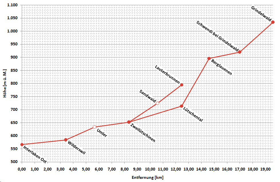 vereinfachtes Höhenprofil der Berner-Oberlandbahn